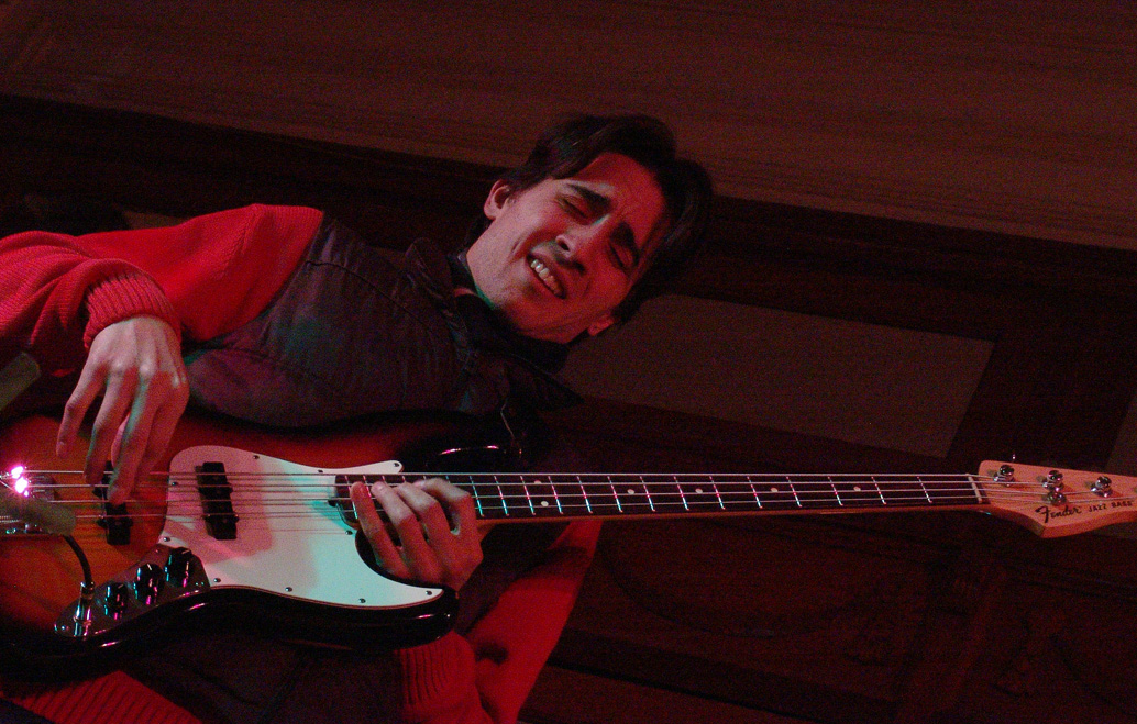 Pablo Elorza en vivo en Buenos Aires.